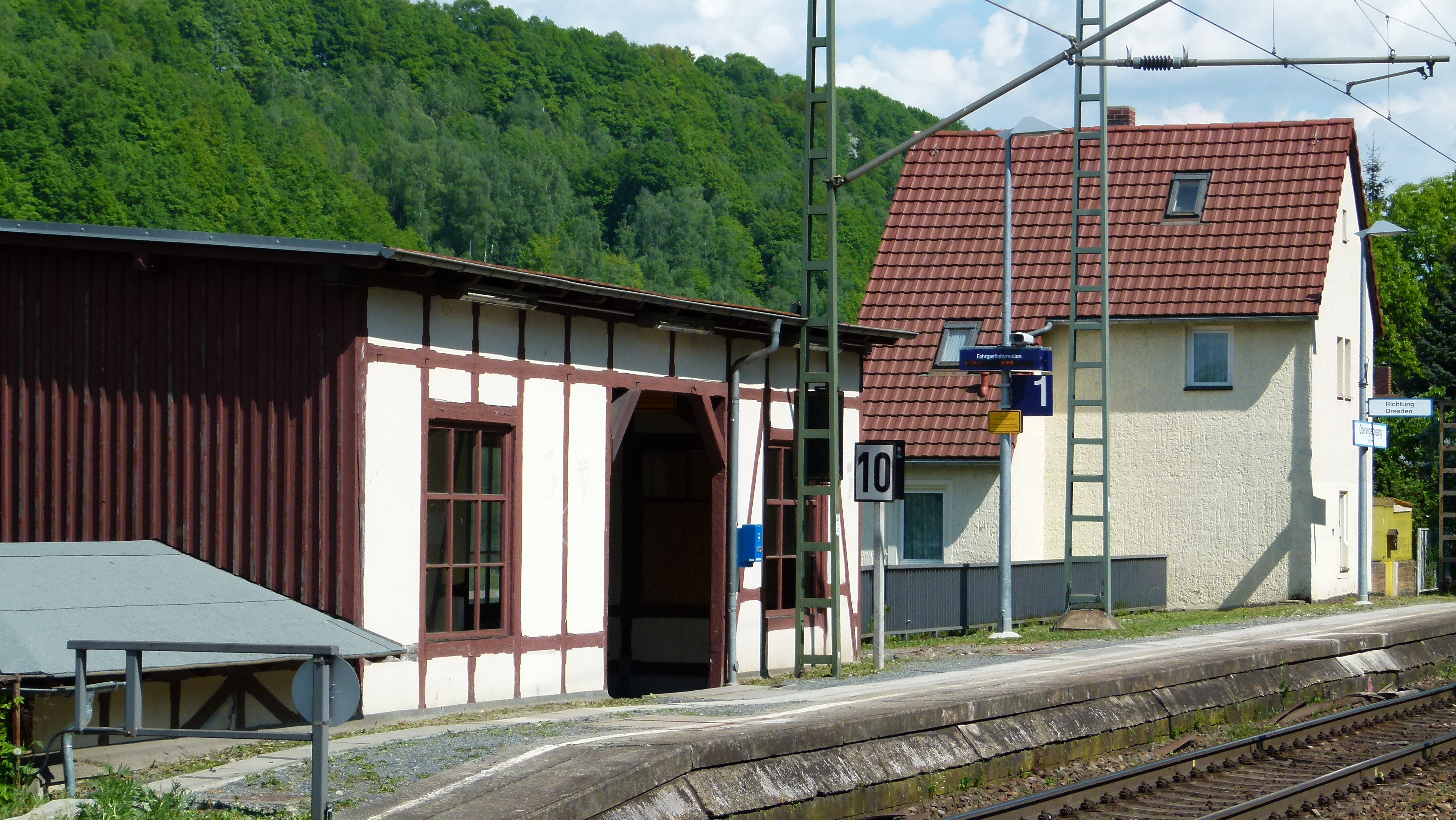 Denkmalgeschützter Bahnhof, Obervogelsang, Pirna, Sachsen